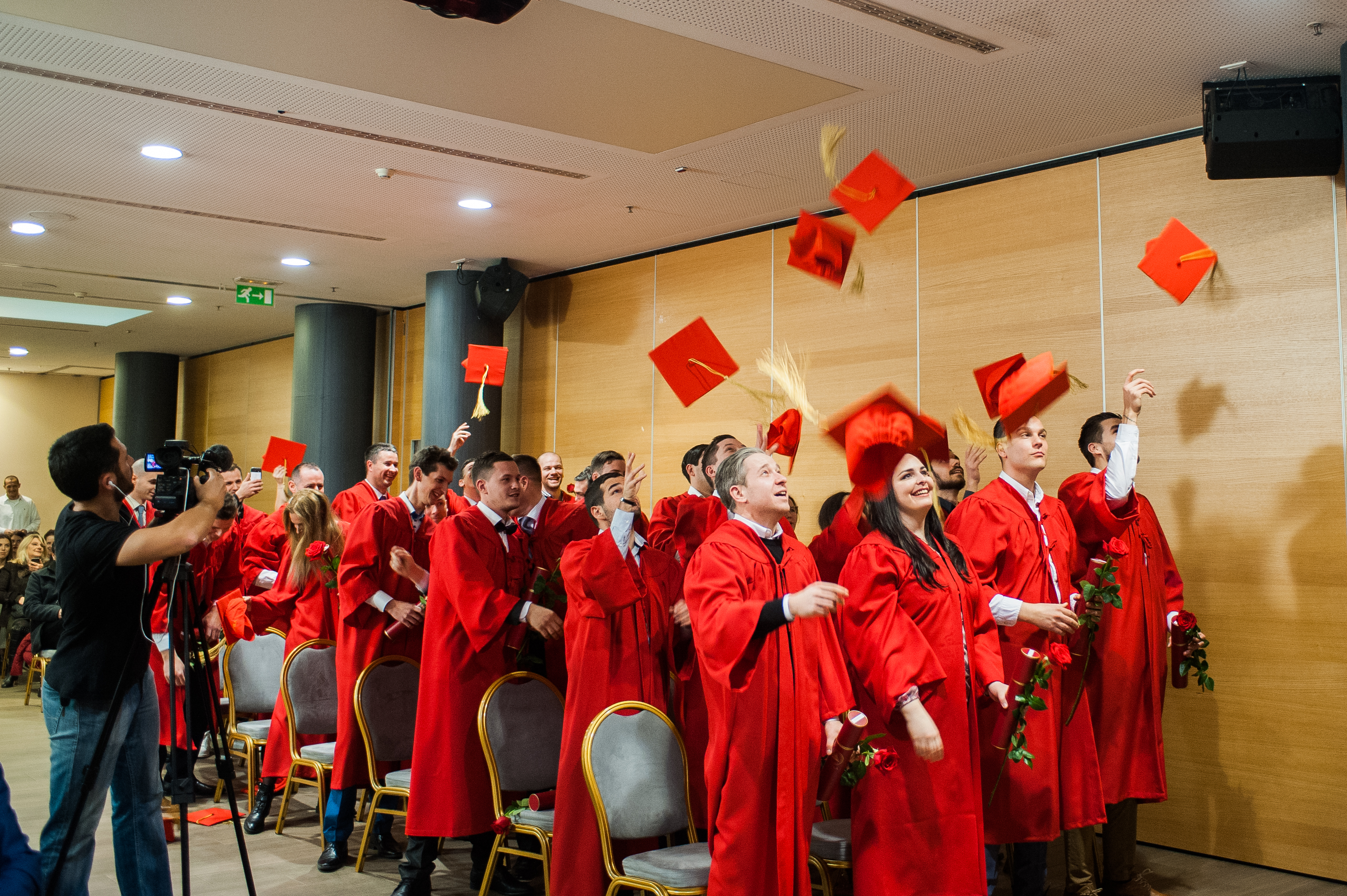 Visoka škola Aspira